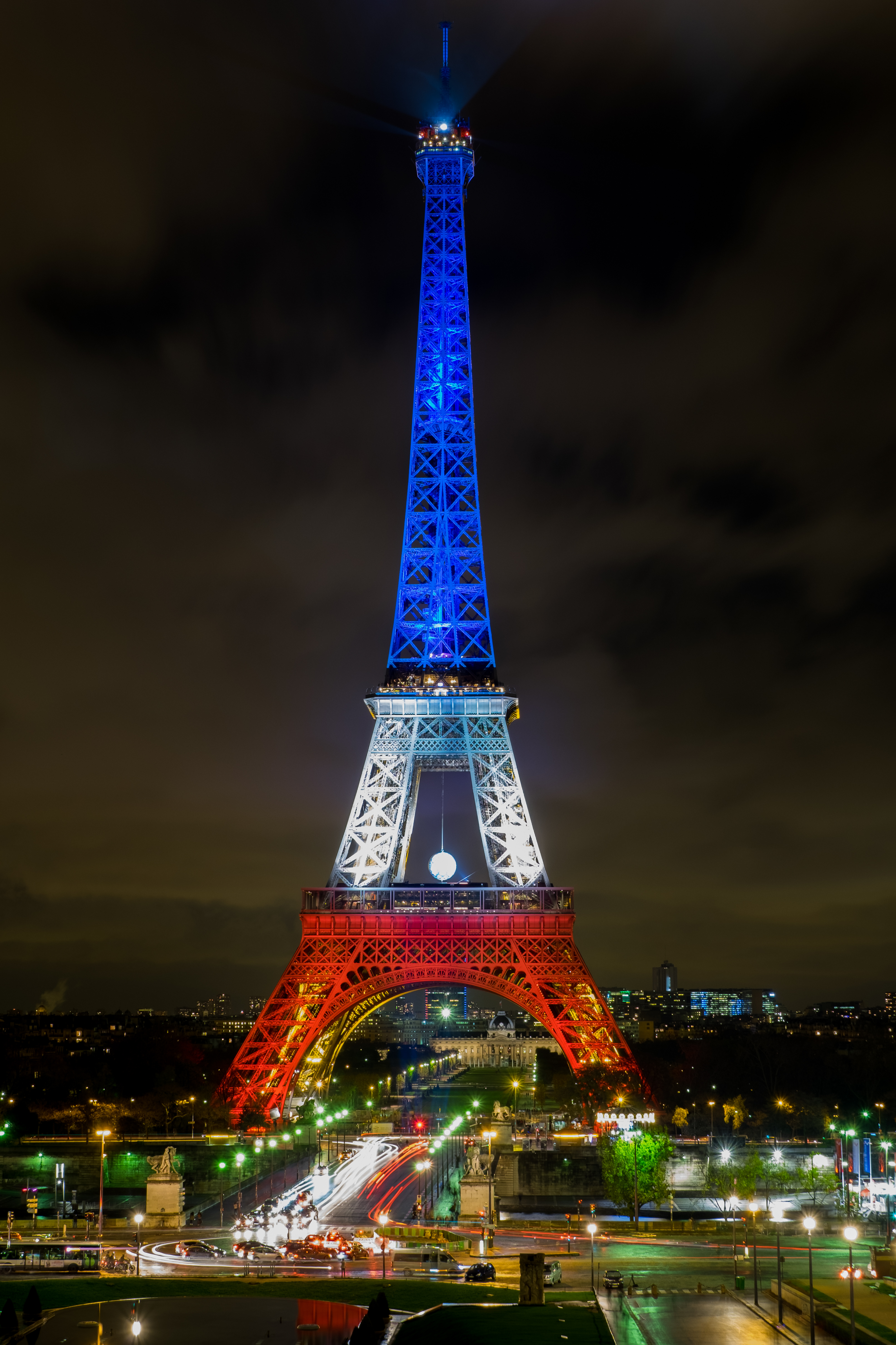 La tour Eiffel aux couleurs françaises après les attentats du 13 novembre 2015.